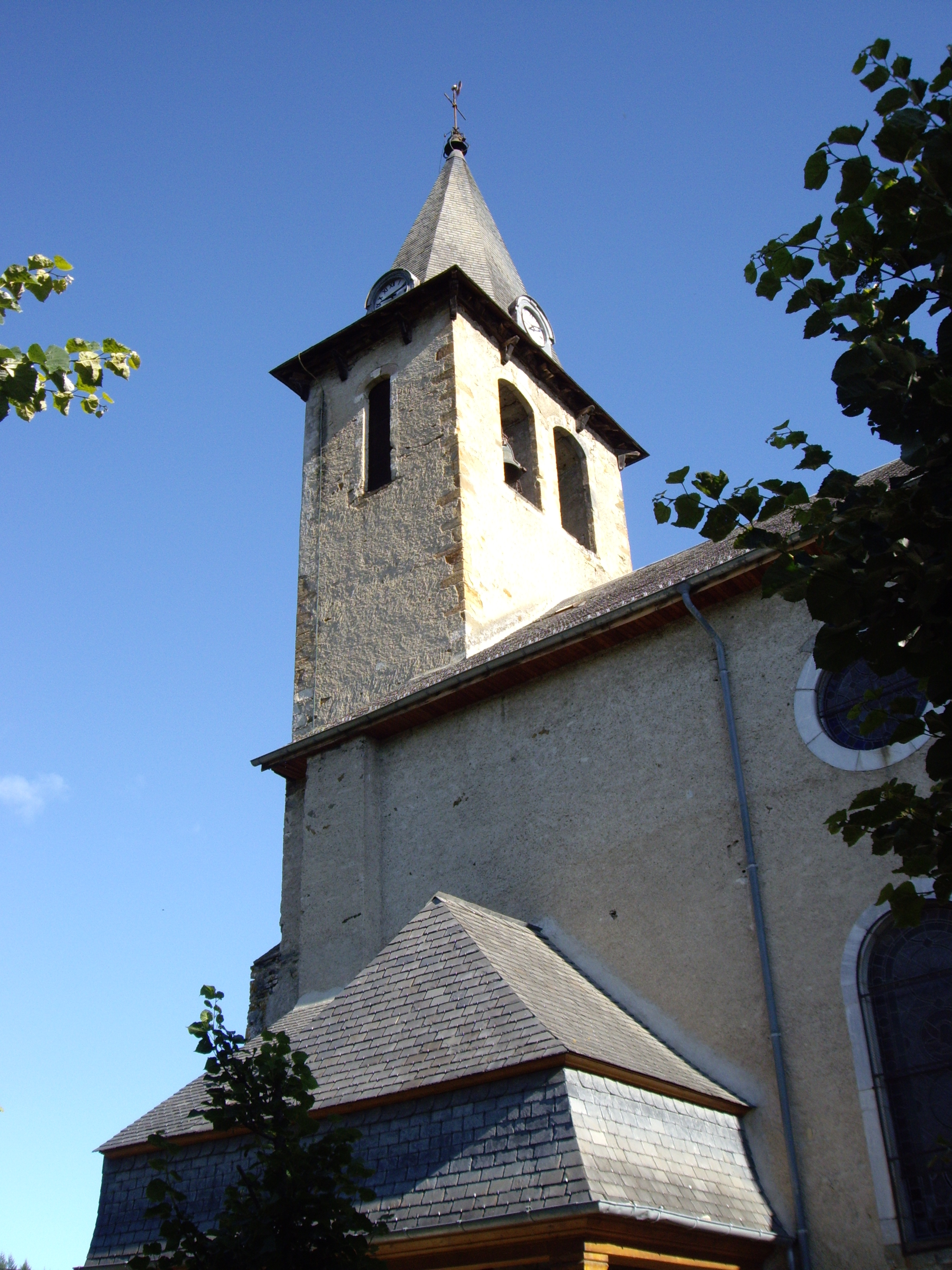 église de Trébons (65)